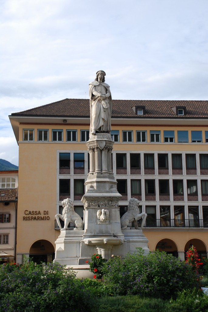 Walther von der Vogelweide monument